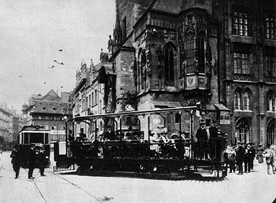 Výletní tramvaj na Staroměstském náměstí v Praze. V období od roku 1902 do 1915 J. K. systematicky vytvářel obrazovou dokumentaci Prahy.